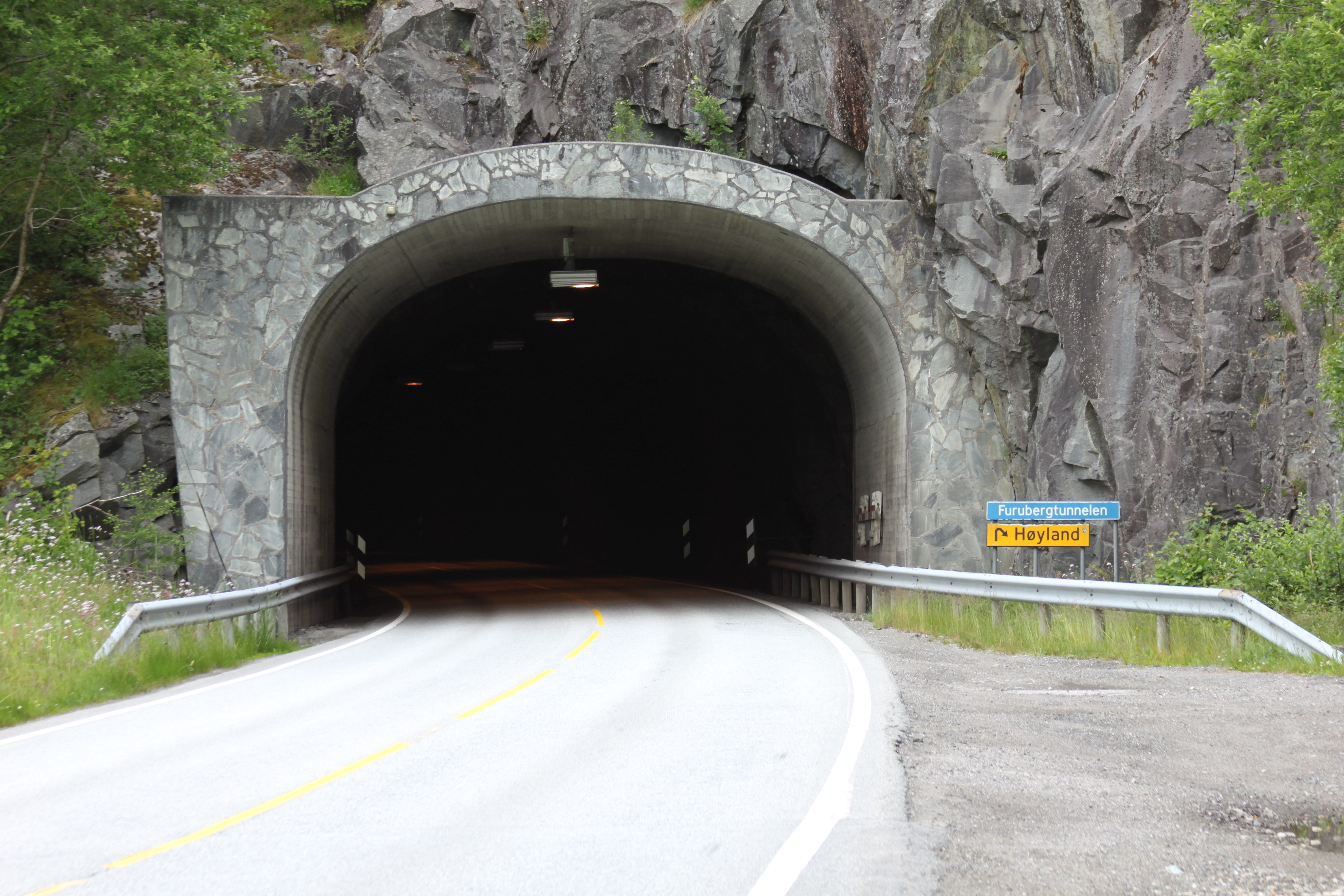 Furubergtunnelen på fylkesvei 57 i Lindås kommune